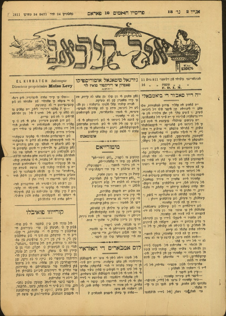 Вестник "Кирбач"